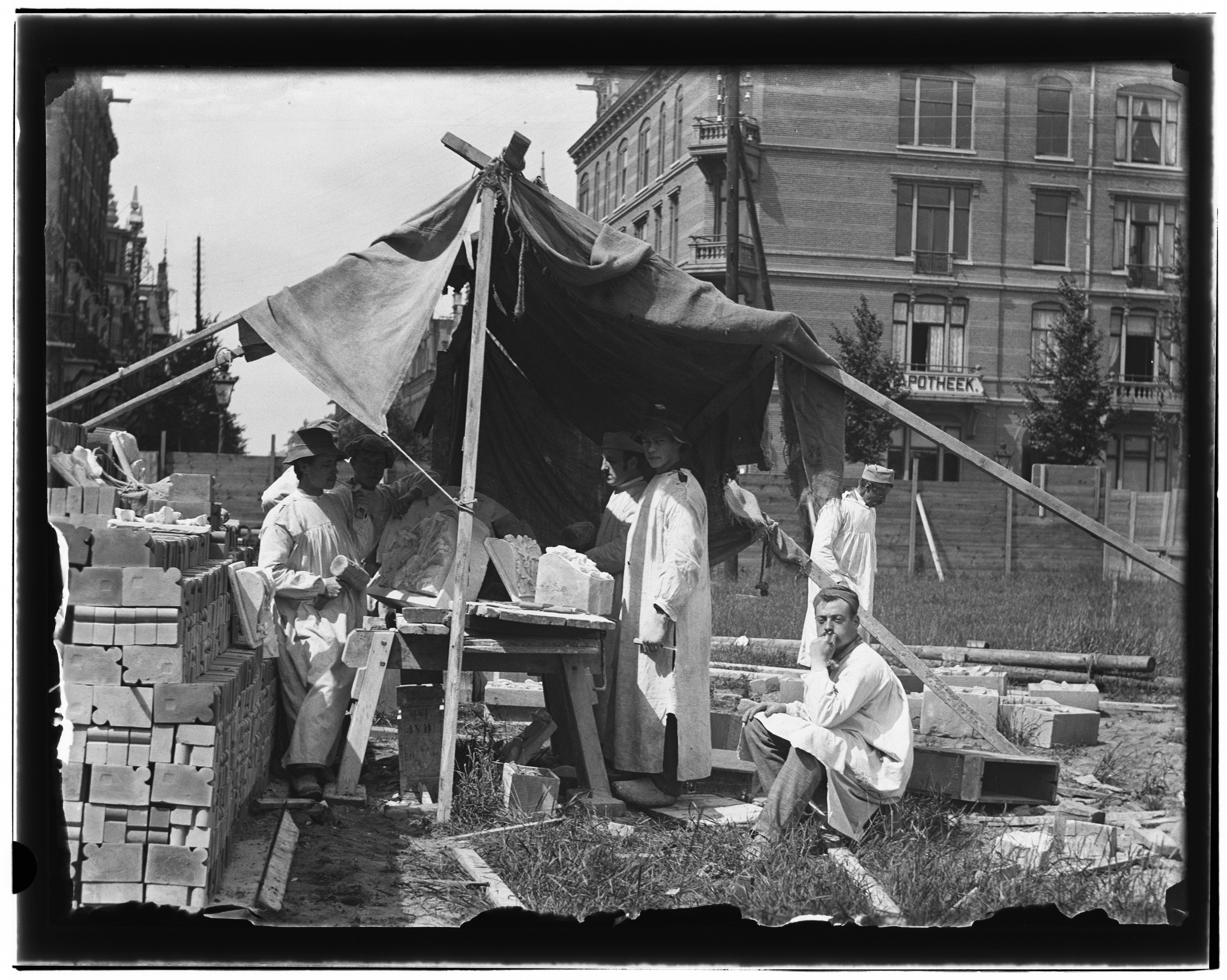 Beschrijving Paulus Potterstraat 13 Groep beeldhouwers aan het werk``, gezien naar de Van Baerlestraat``, hoek Willemsparkweg. Documenttype foto Vervaardiger Olie``, Jacob (1834-1905) Collectie Collectie Jacob Olie Jbz. Datering 21 juni 1894 Geografische naam Paulus Potterstraat Inventarissen Afbeeldingsbestand 10019A000871 Generated with Dememorixer